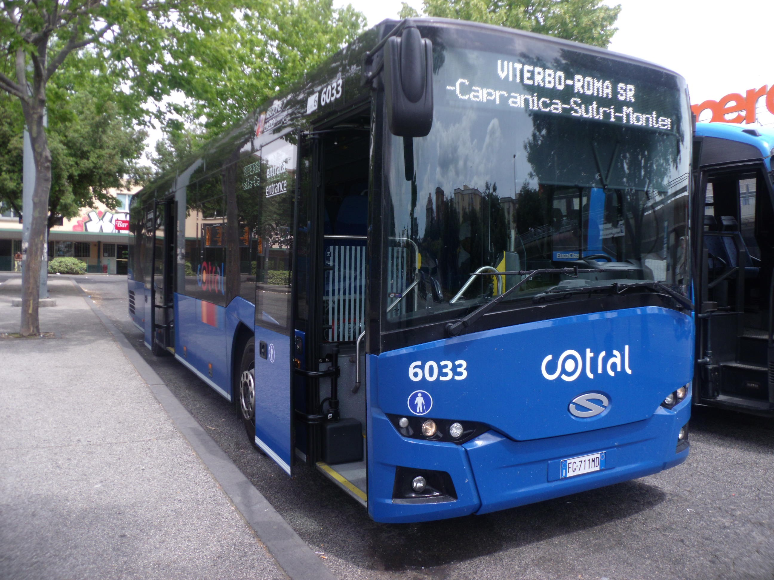 Il Solaris Interurbino 6033 della CoTral fermo al Capolinea Riello di Viterbo in attesa della partenza per Roma.